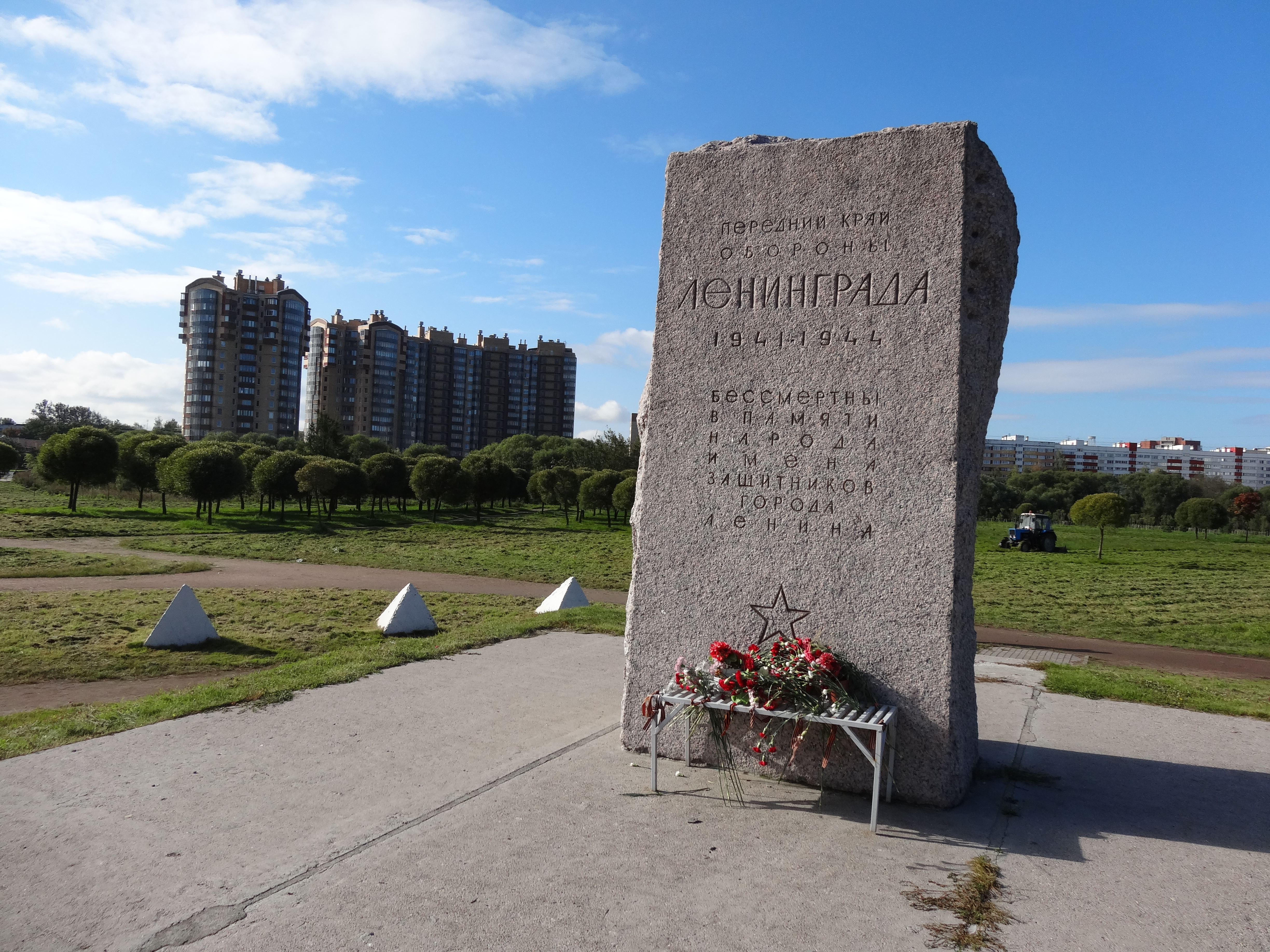 Мемориал в память обороны города в 1941-1944 гг. - 'Зеленый пояс Славы Ленинграда'. 'Кировский вал': проспект Маршала Жукова (напротив дома 38 корпус 1 по улице Стойкости), Красносельский район, Санкт-Петербург